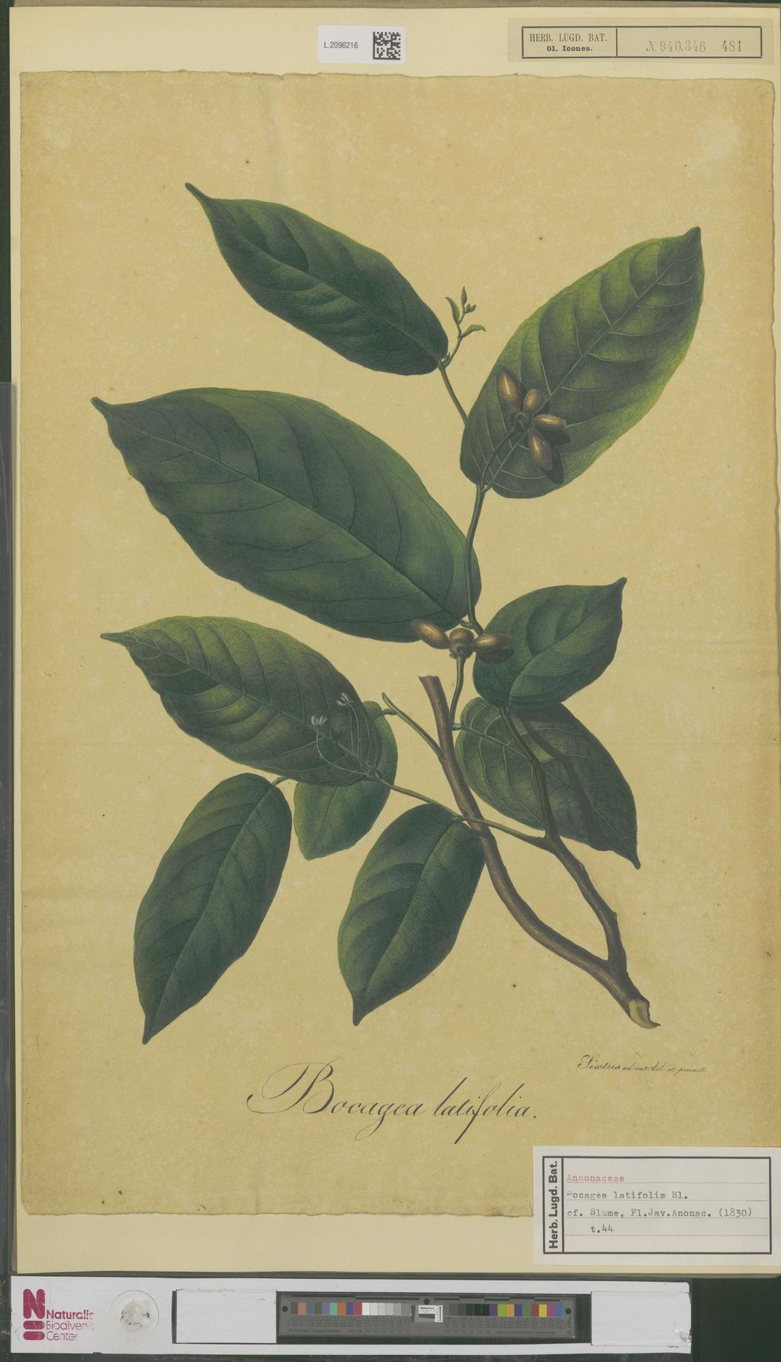 Bocagea latifolia Blume